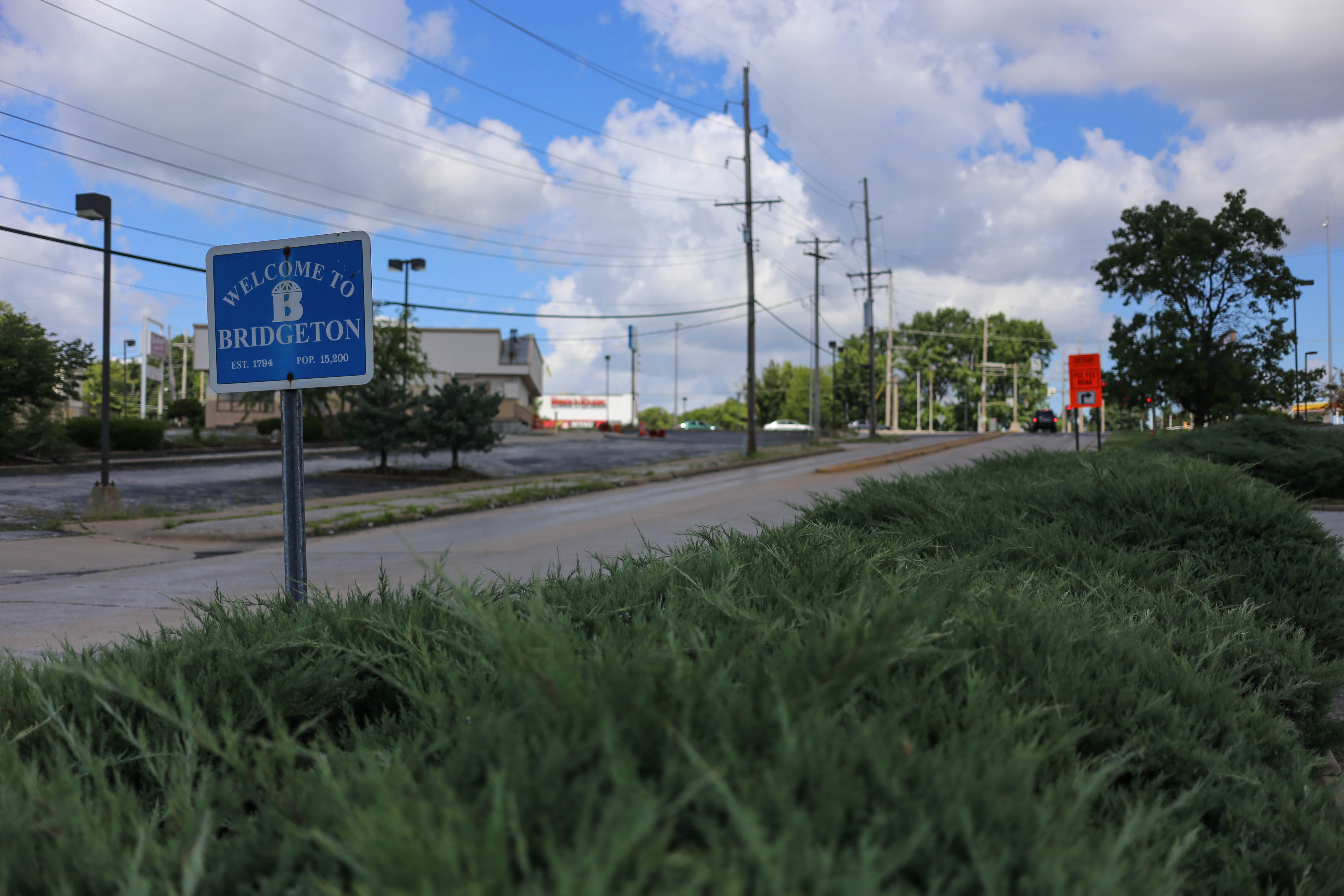 Pop. 15,200